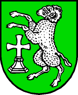 Gemeinde Scheffau am Tennengebirge: In grünem Schild ein silberner Widder, rechts begleitet von einem silbernen Standkreuz